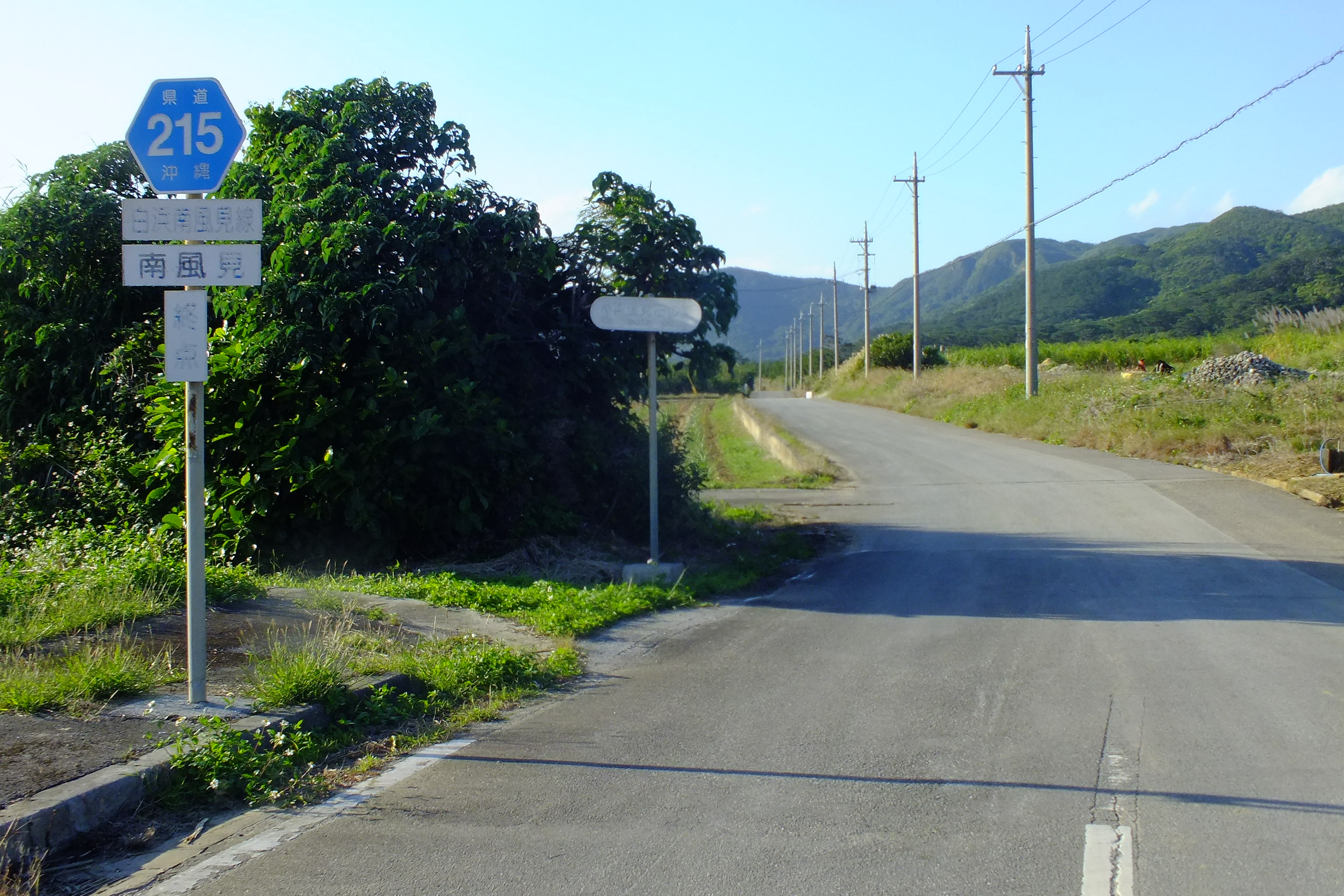 2017-01-26 Okinawa-Kendo 215 沖縄県道215号白浜南風見線 南風見